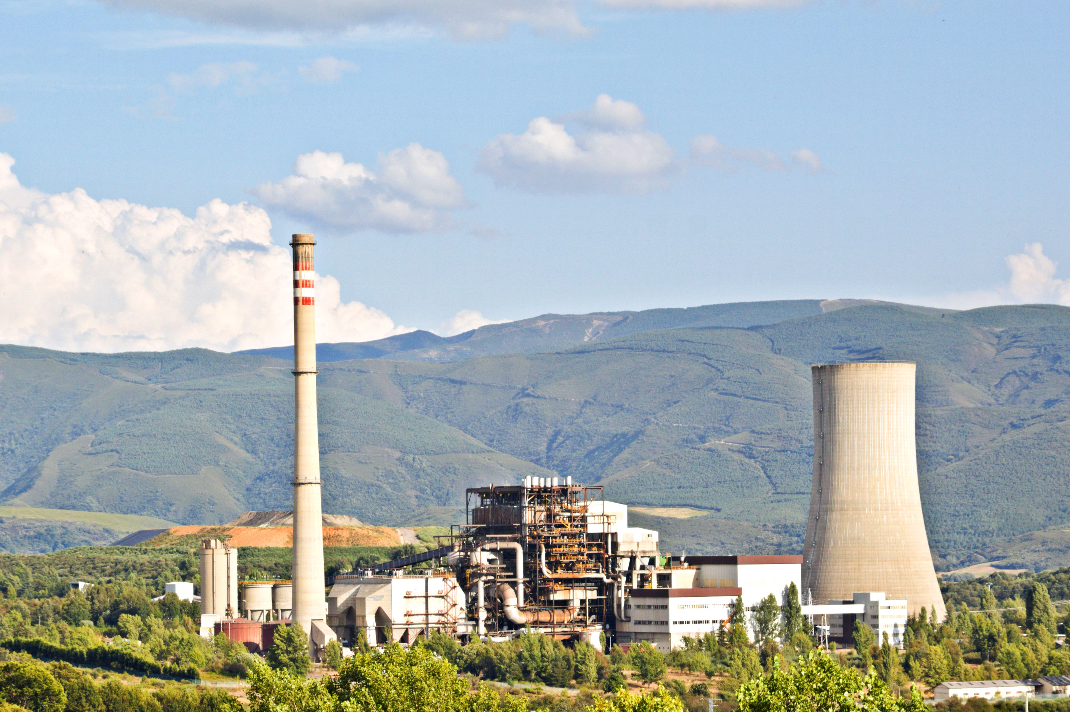 Anllares del Sil, localidad de Páramo del Sil, comarca de El Bierzo, provincia de León.